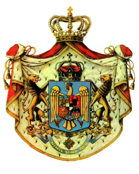 Escudo de armas Grande del Reino de Rumania.